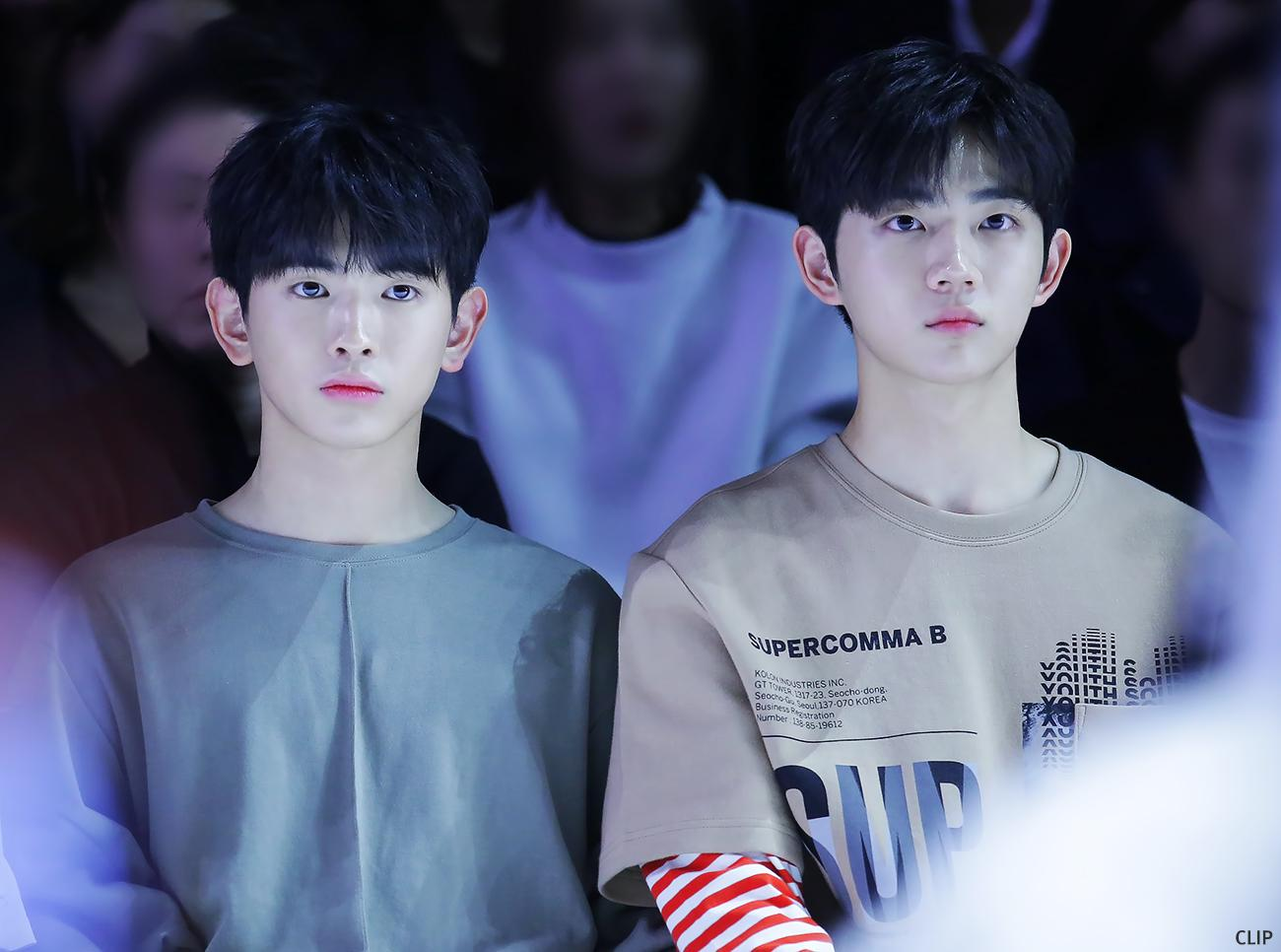 171018_헤라 서울패션위크 슈퍼콤마비